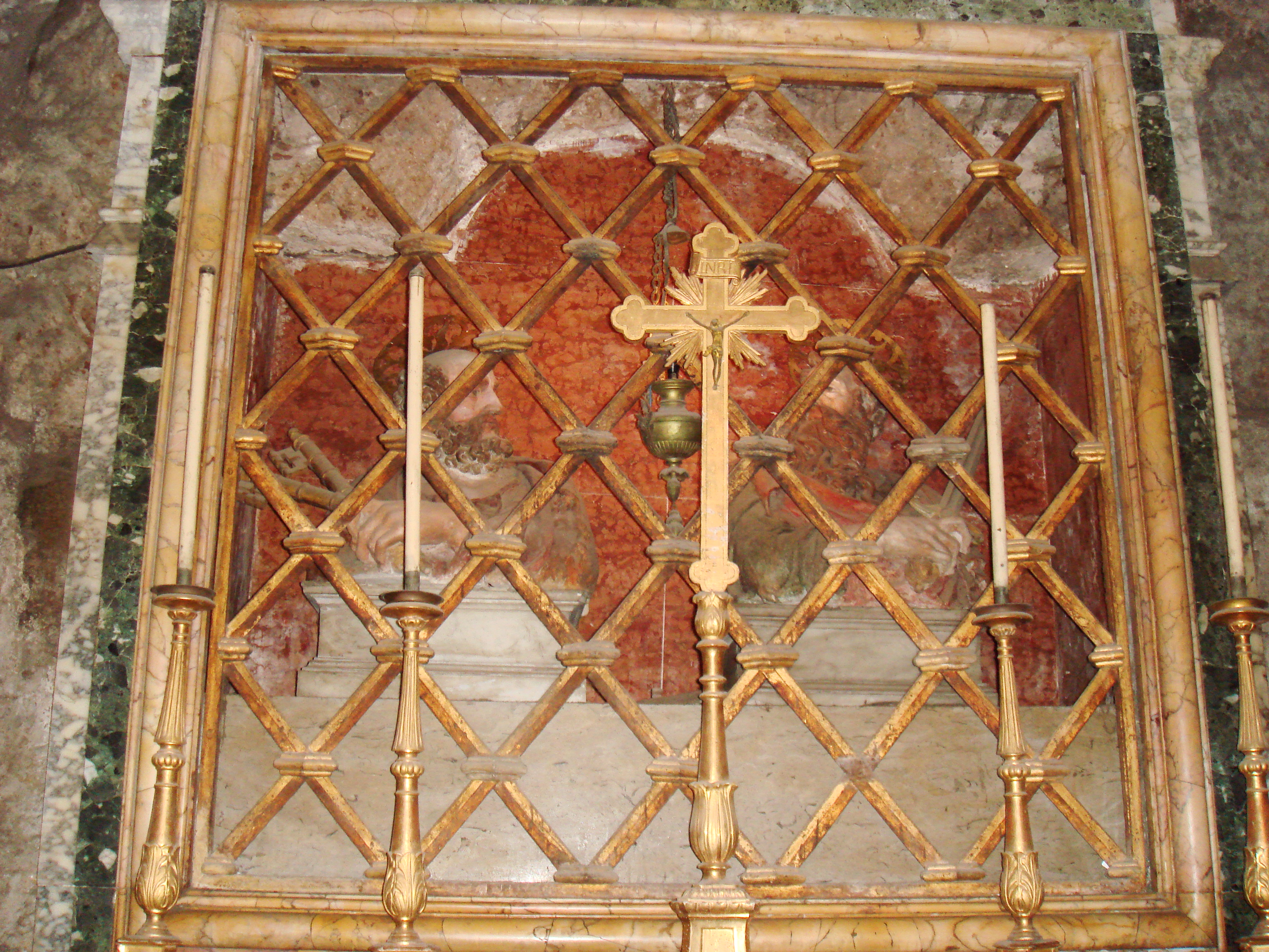 Busti dei santi Pietro e Paolo. Dettaglio dell'altare nel Carcere Mamertino (antico carcere di Roma). Secondo una leggenda (peraltro priva di qualsiasi riscontro storico), vi sarebbero stati imprigionati San Paolo e San Pietro. Si noti che a quanto consta dalle sue epistole, Paolo a Roma durante il processo fu tenuto agli "arresti domiciliari" sotto sorveglianza, e non in un carcere sotterraneo incatenato ad una colonna. La legenda aggiunge che i due santi avrebbero fatto miracolosamente scaturire acqua per battezzare i carcerieri da loro convertiti.